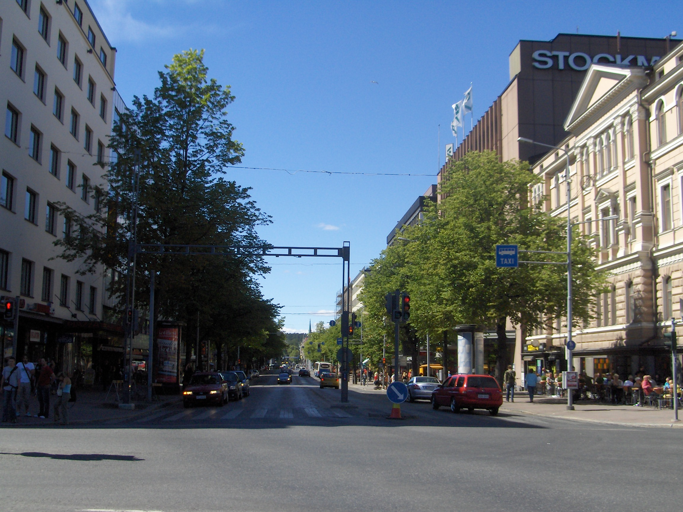 Hämeenkatu, Tampere